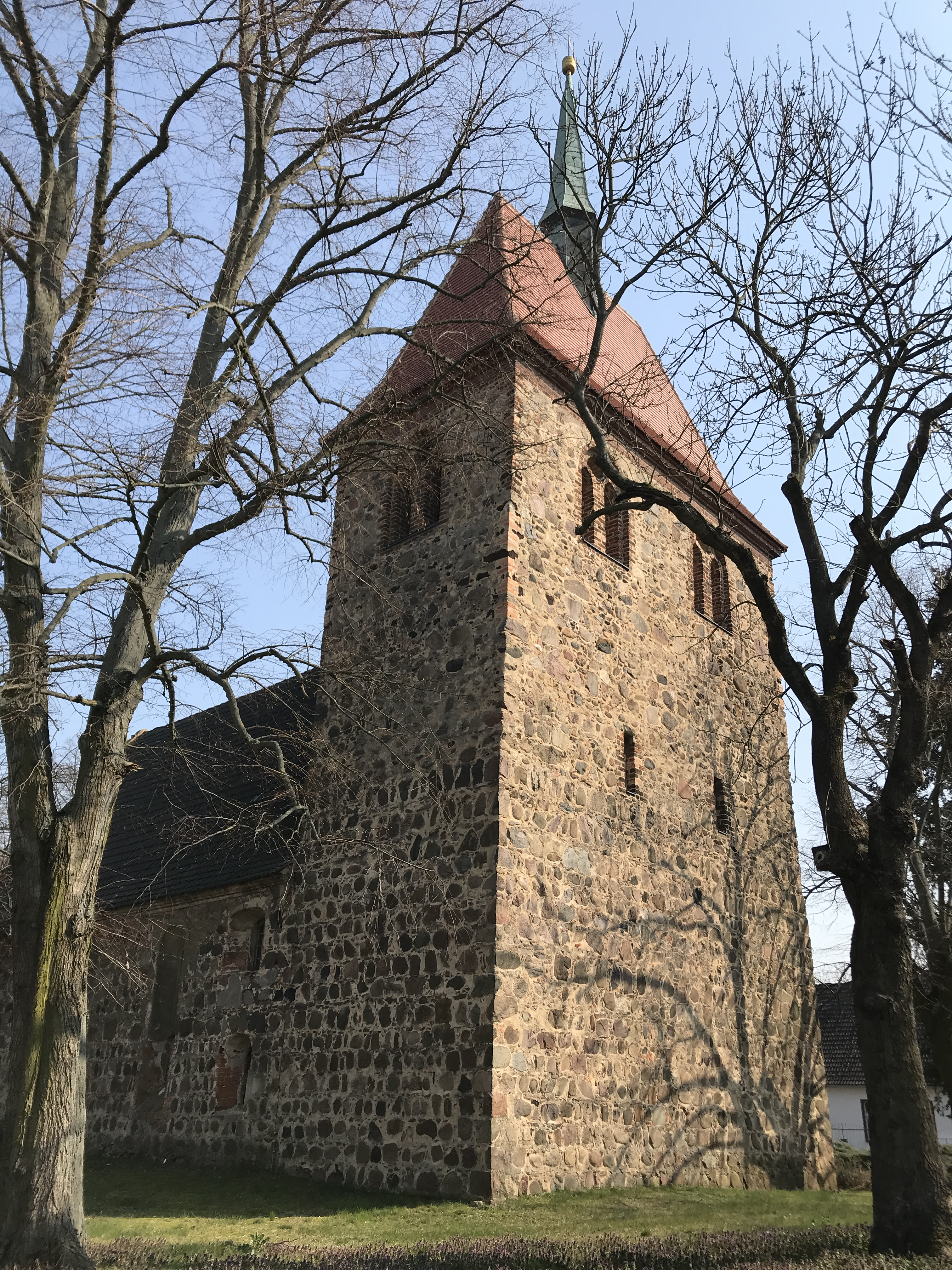 Die Dorfkirche Gießmannsdorf ist eine frühgotische Saalkirche in Gießmannsdorf, einem Ortsteil der Stadt Luckau im Landkreis Dahme-Spreewald im Land Brandenburg. Im Innern steht unter anderem ein spätklassizistischer Kanzelaltar aus der Zeit um 1865.